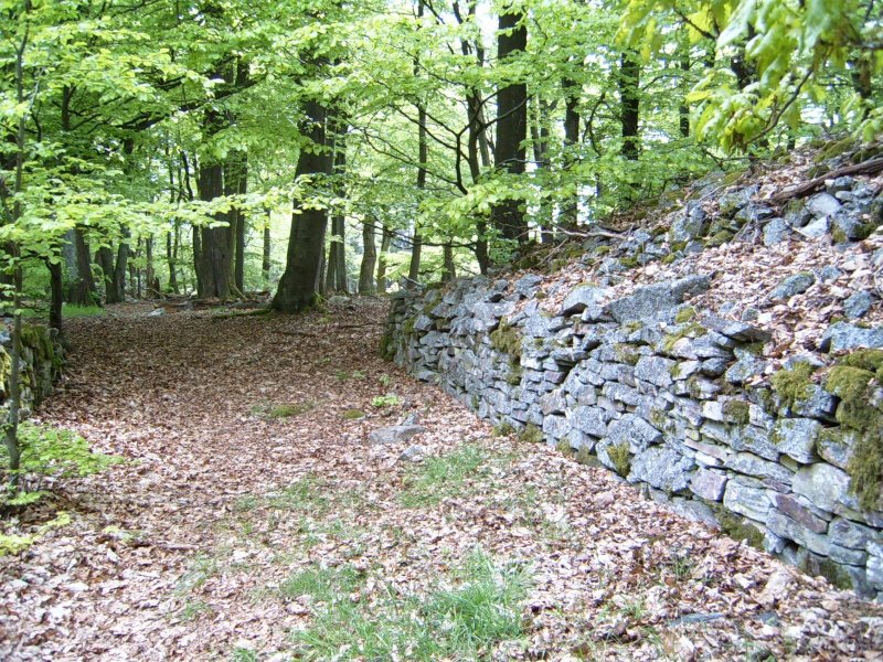 Bildbeschreibung:Ringwall bei Allenbach Quelle: selbst fotografiert Fotograf: Matw